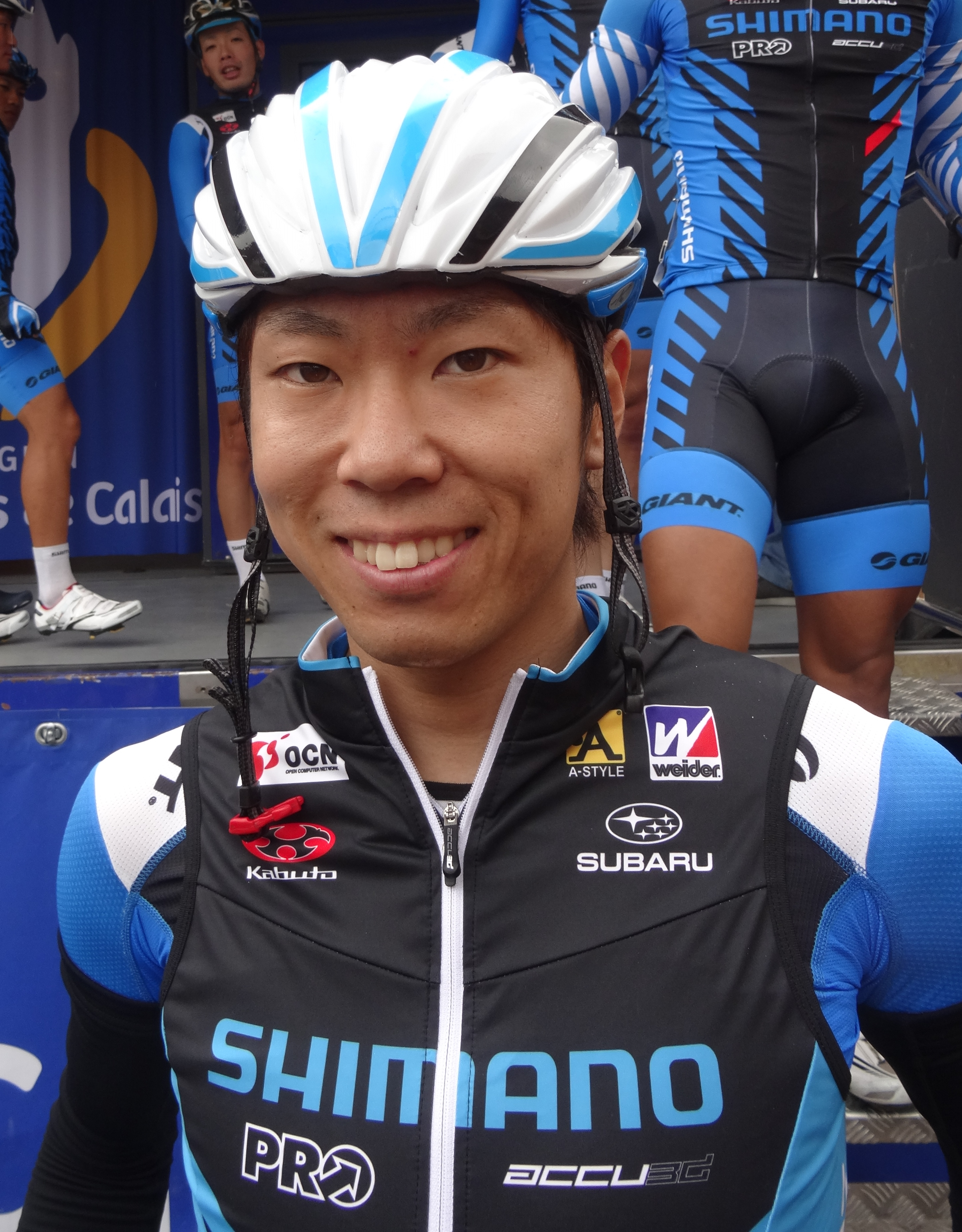 Reportage photographique réalisé le dimanche 13 juillet à l'occasion du départ et de l'arrivée de la Ronde pévéloise 2014 à Pont-à-Marcq, Nord-Pas-de-Calais, France.